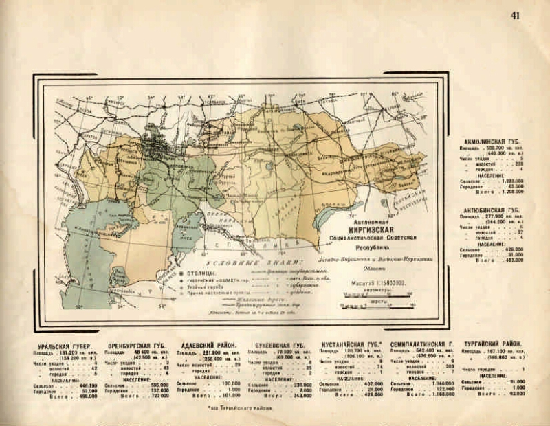 Карта Автономной Киргизской Социалистической Советской Республики 1925 года